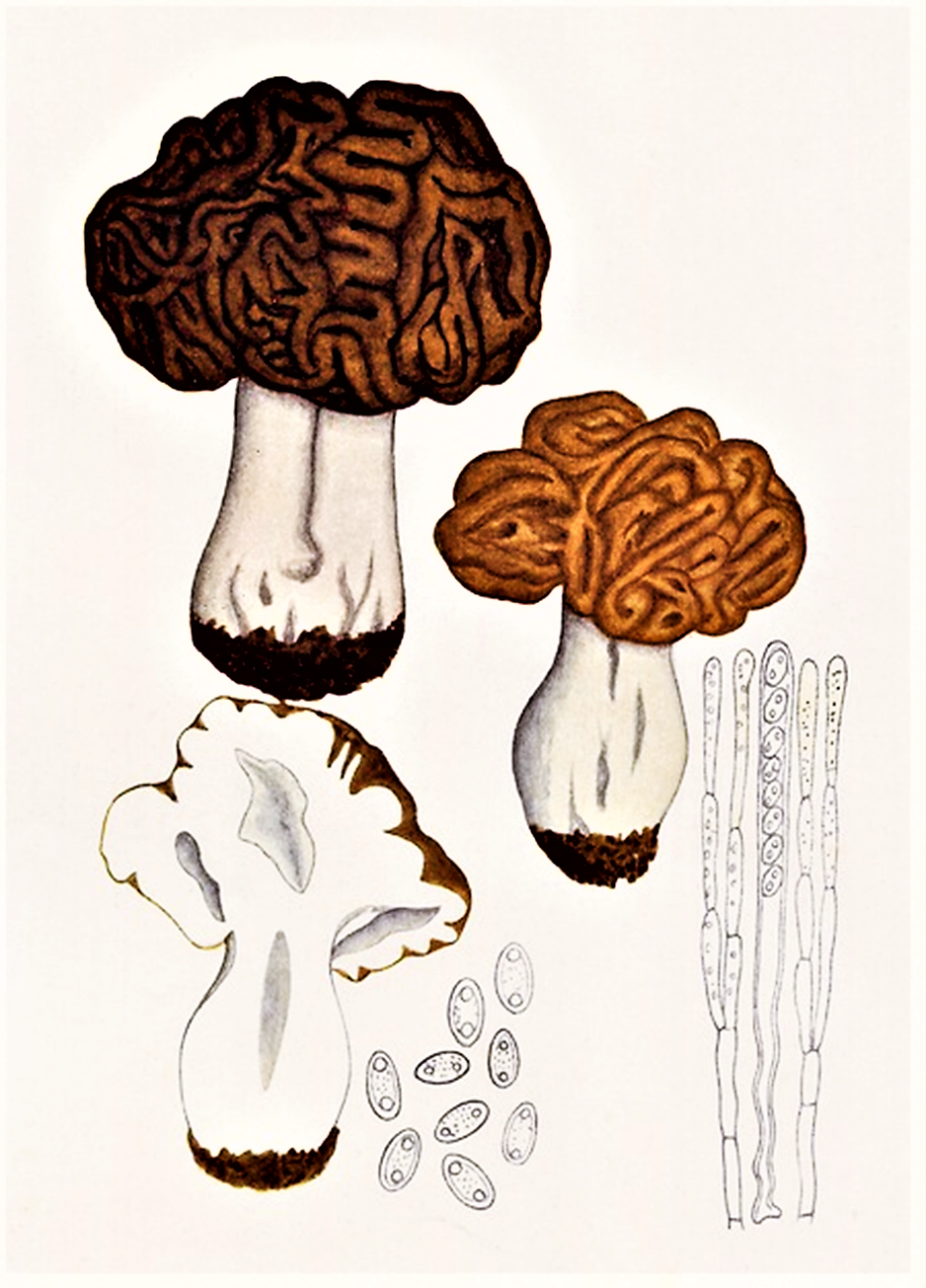 Giacomo Bresadola: Gyromitra esculenta (Pers.) Fr. (1849)